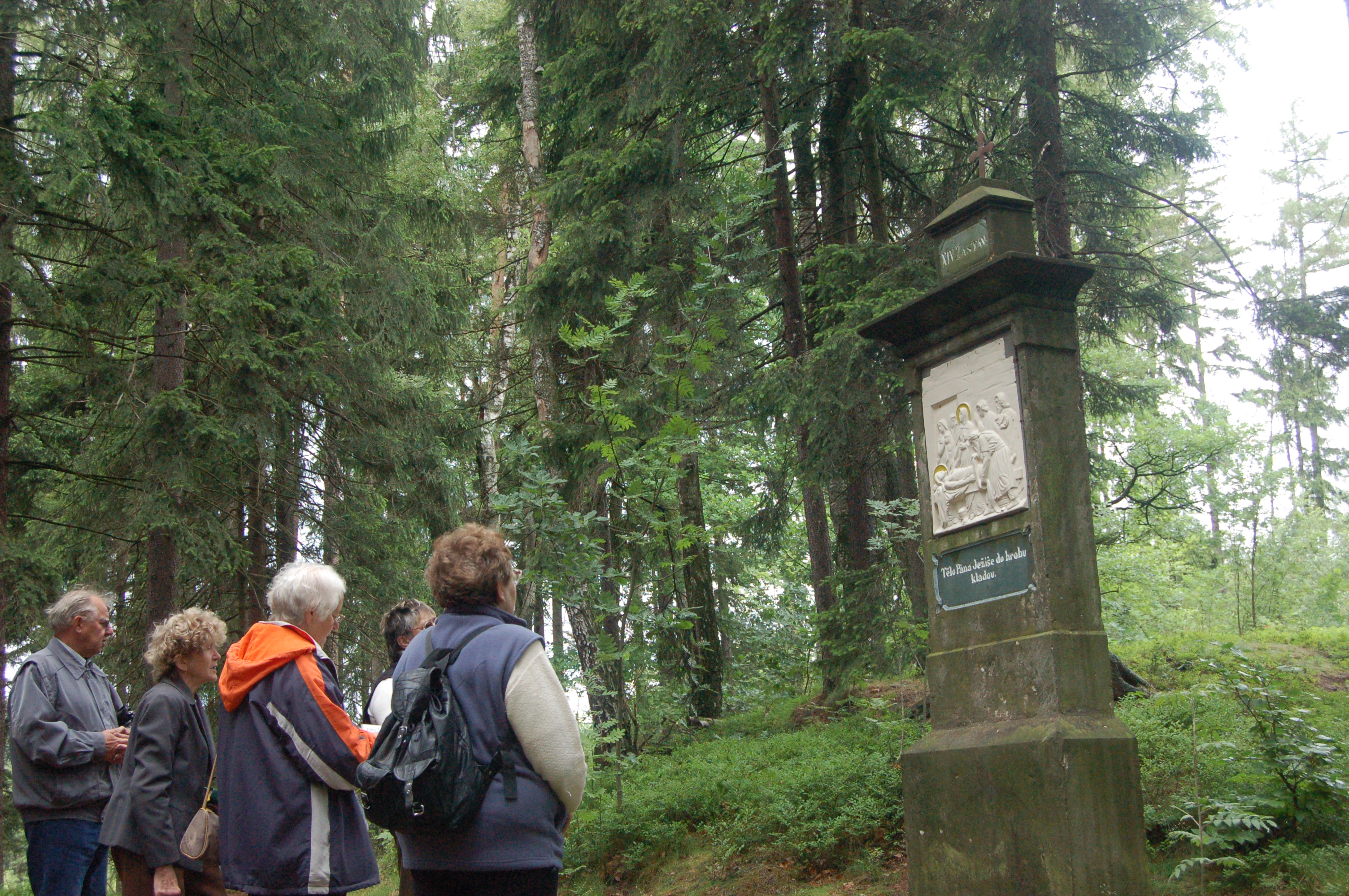 Křižová cesta